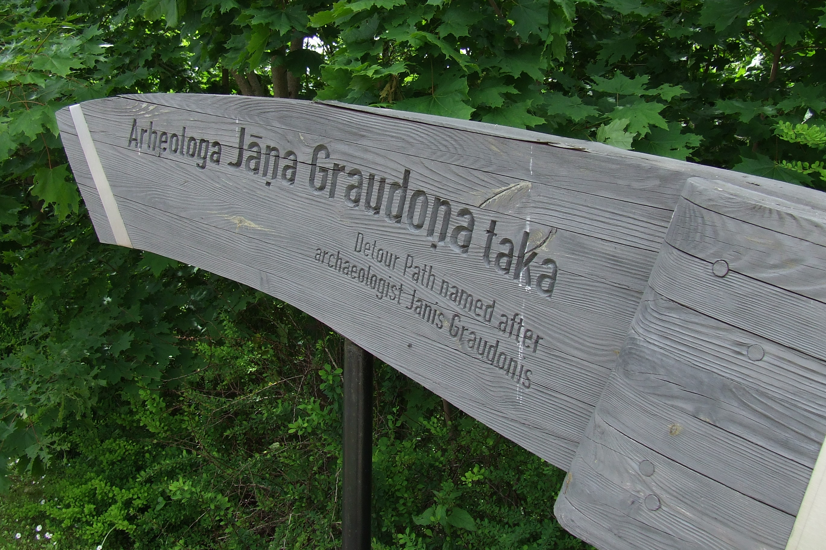 Krimuldas pagasts, Latvia